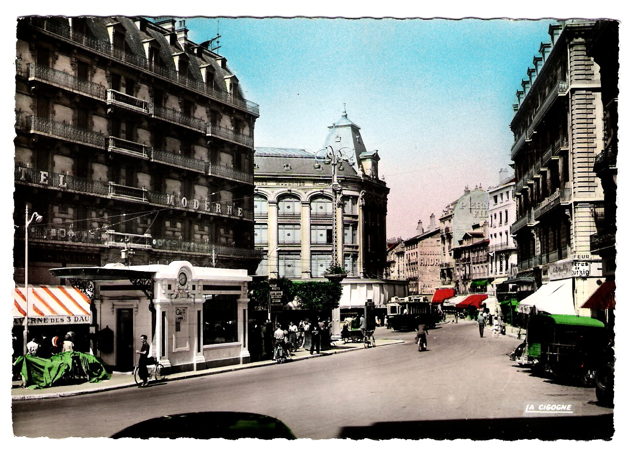 Grenoble, place Grenette - éditions la cigogne